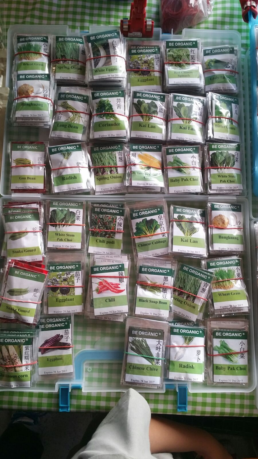 中文（中国大陆）: 新加坡种菜用的种子